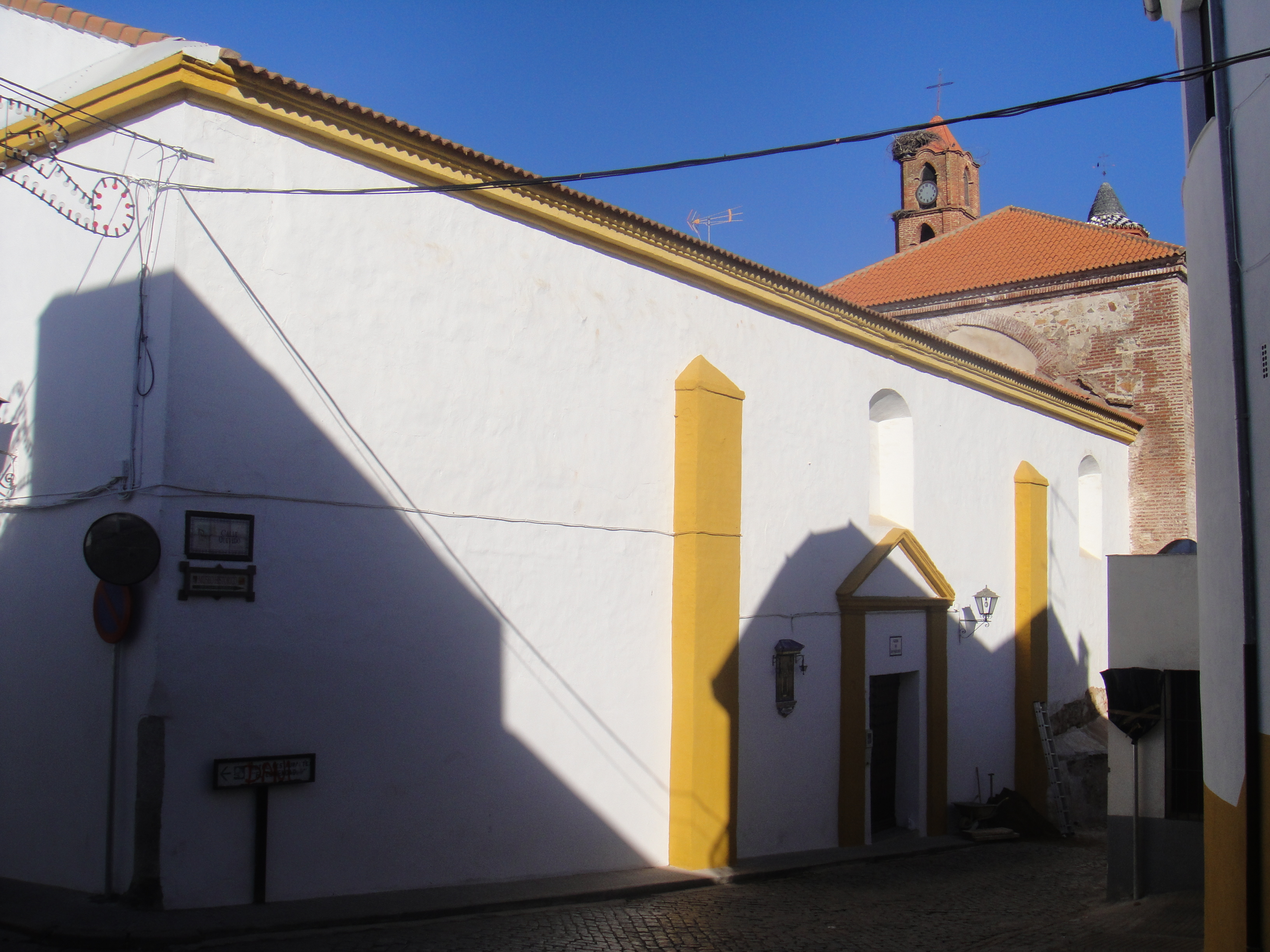 Exterior de la iglesia de San Francisco de Fuente Obejuna, provincia de Córdoba, (España).